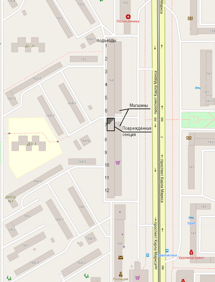 На схеме пронумерованы подъезды и отмечена повреждённая секция дома № 164 This map of Magnitogorsk was created from OpenStreetMap project data, collected by the community. This map may be incomplete, and may contain errors. Don't rely solely on it for navigation.